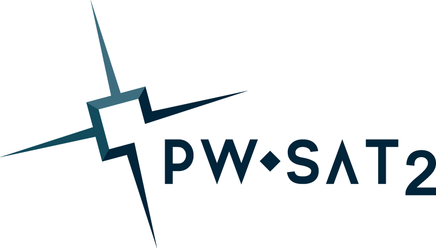 Logo projektu satelity studenckiego PW-Sat2